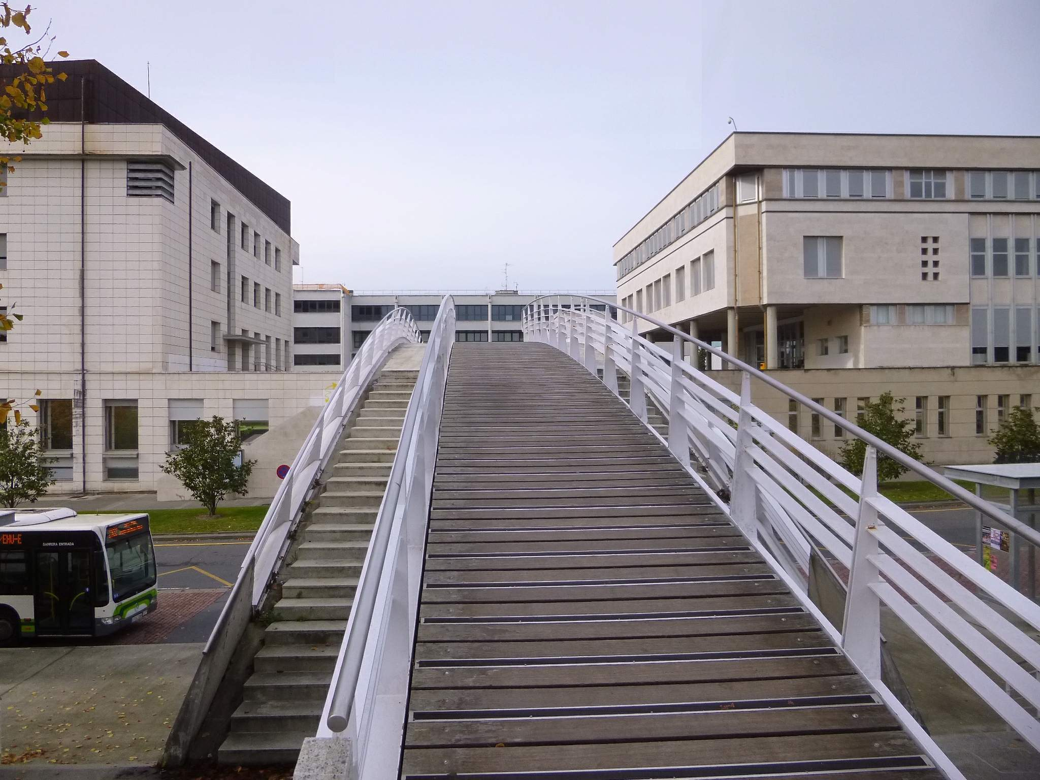 Lejona - Campus de Bizkaia de la UPV-EHU - Facultad de Derecho (Sección Bizkaia) y Escuela Universitaria de Relaciones Laborales 1